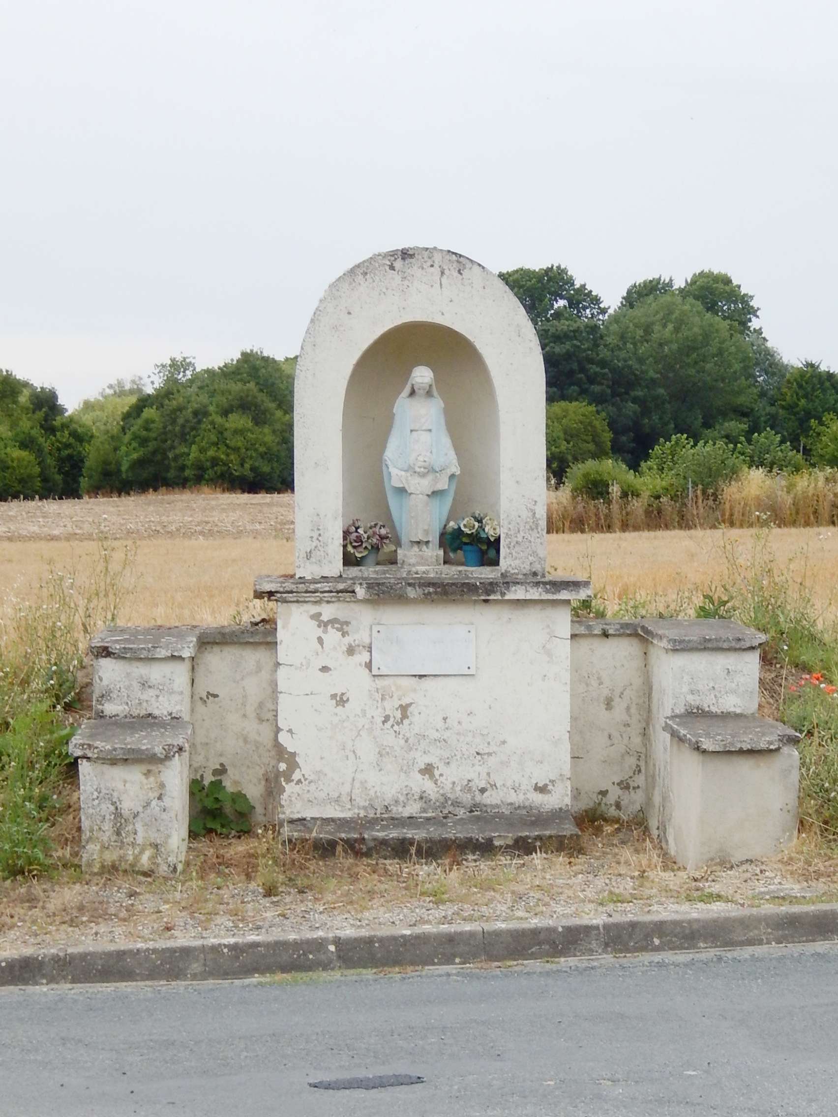 Une vierge sur la route reliant le village français de Saint-Nazaire-sur-Charente (Charente-Maritime) au fort Lupin.